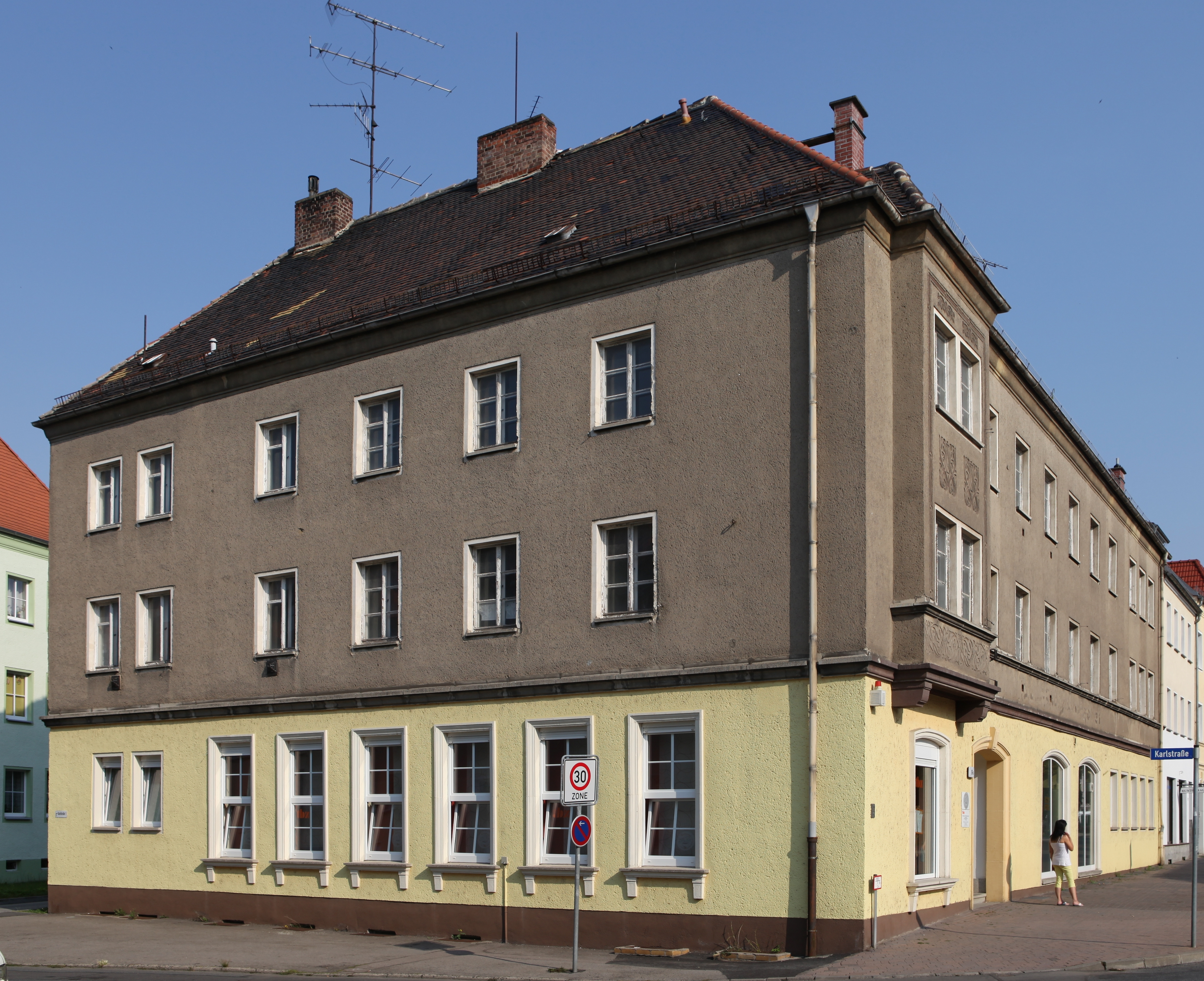 Kulturdenkmal Mietshaus Karlstraße 1 in Eilenburg; Objektnummer: 08973241